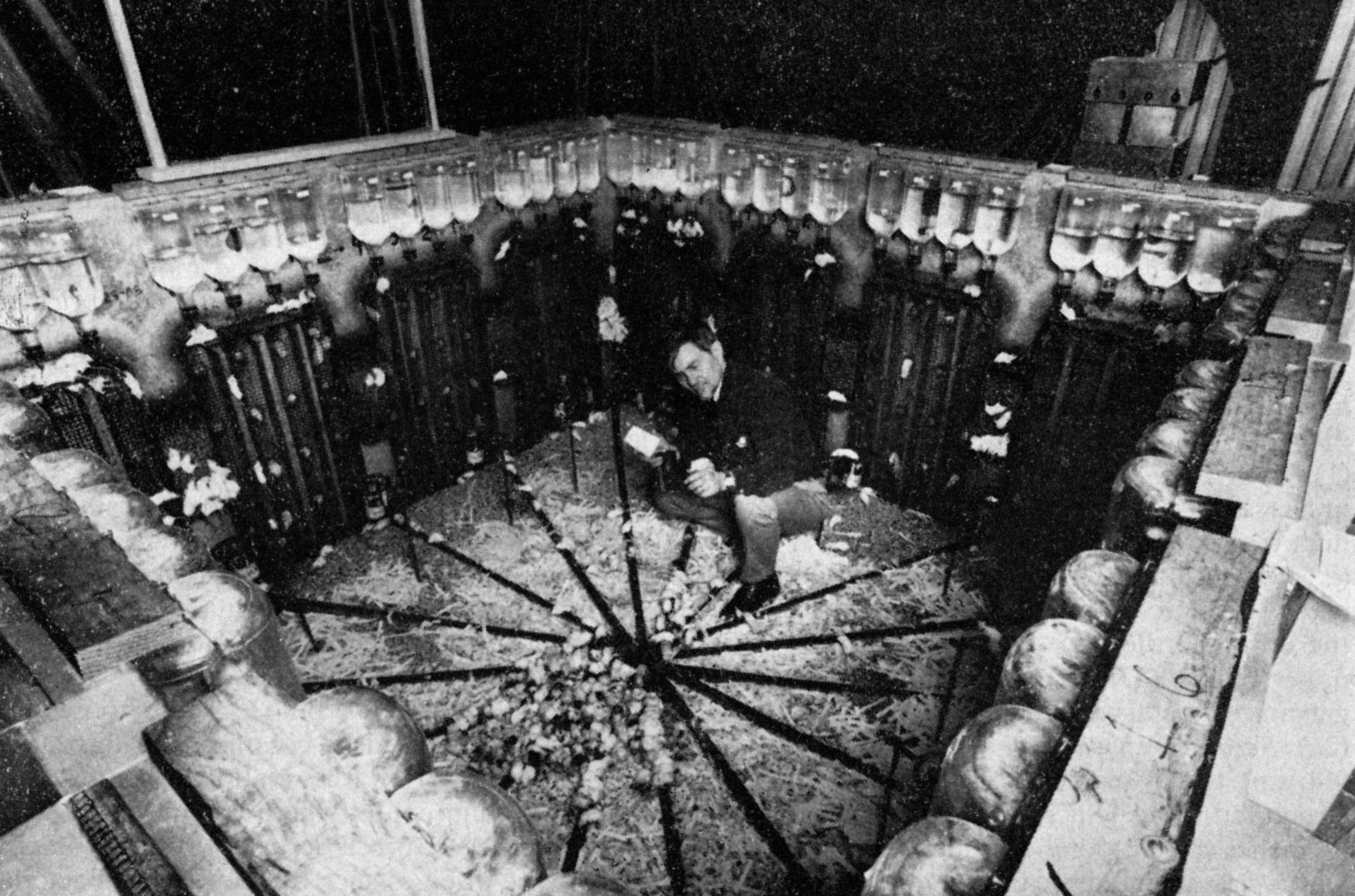 Джон Кэлхун проводит эксперимент с крысами